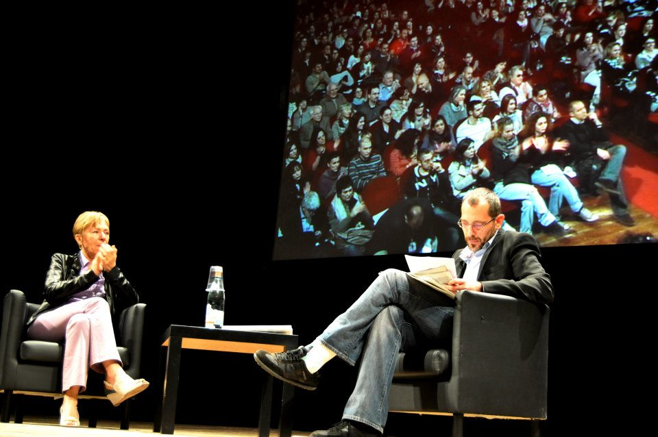 Milena Gabanelli e Corrado Formigli al Festival Internazionale del Giornalismo di Perugia.